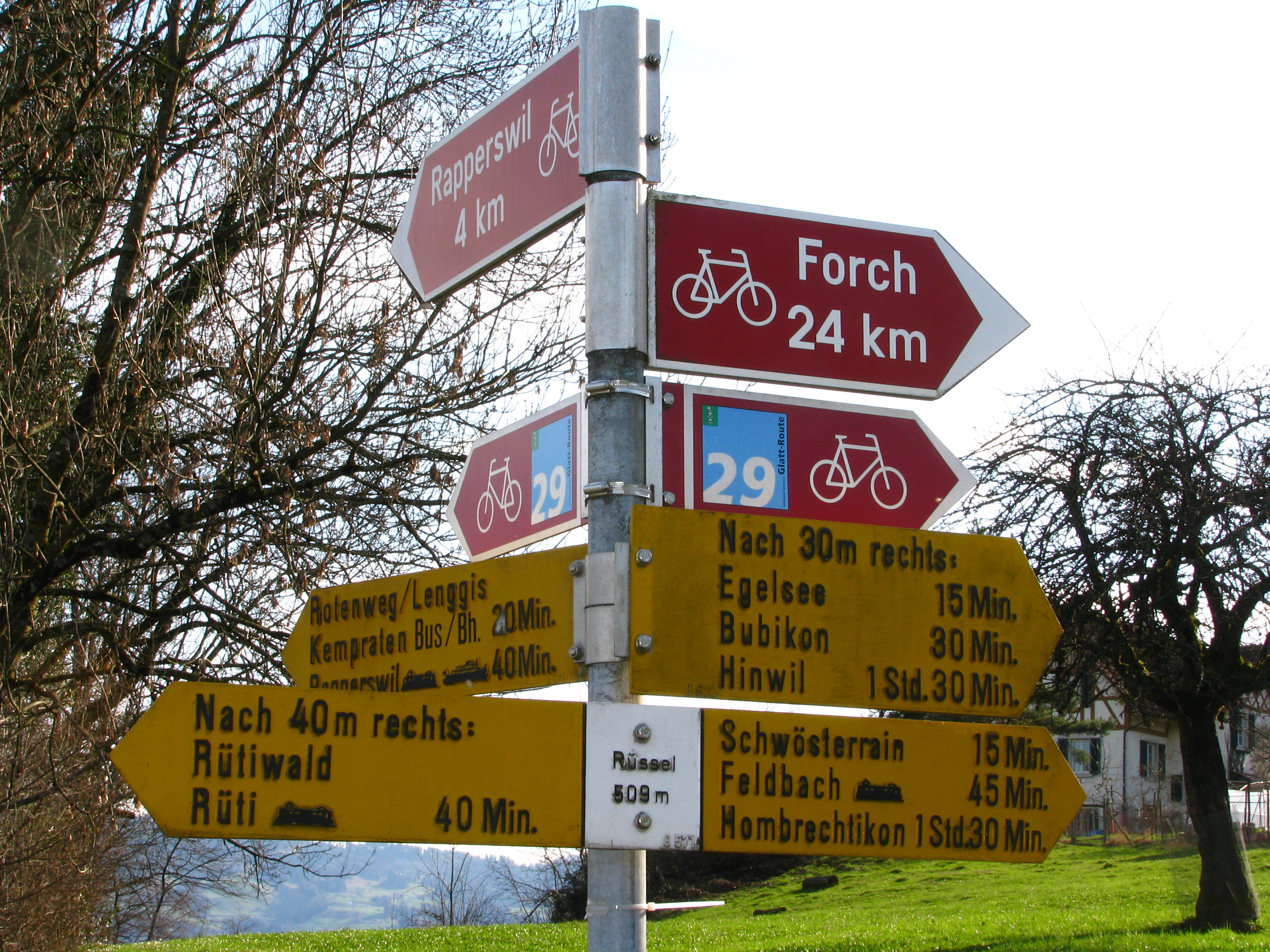 Nearby Wolfhausen in Bubikon (Switzerland)